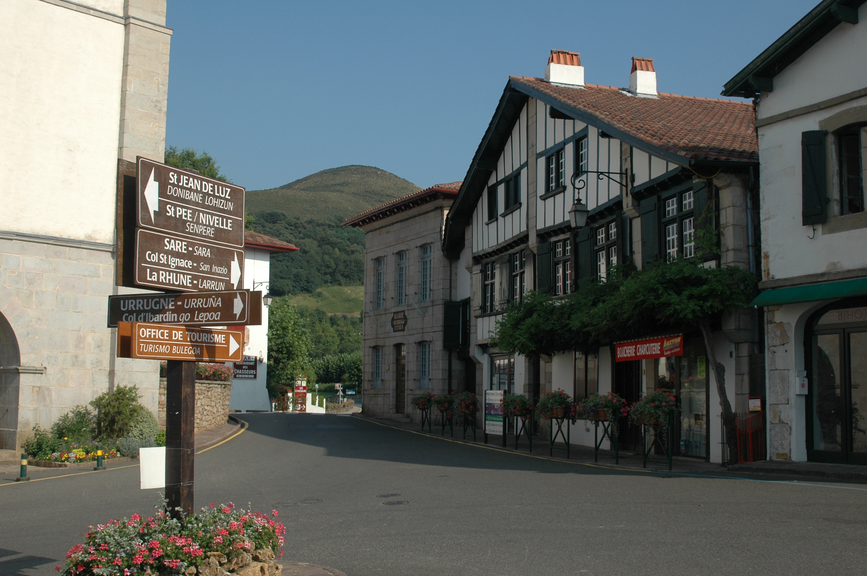 Ascain, signalisation bilingue française et basque. Photo prise le 23/07/06 par Harrieta171